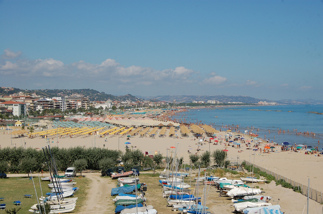 Pescara